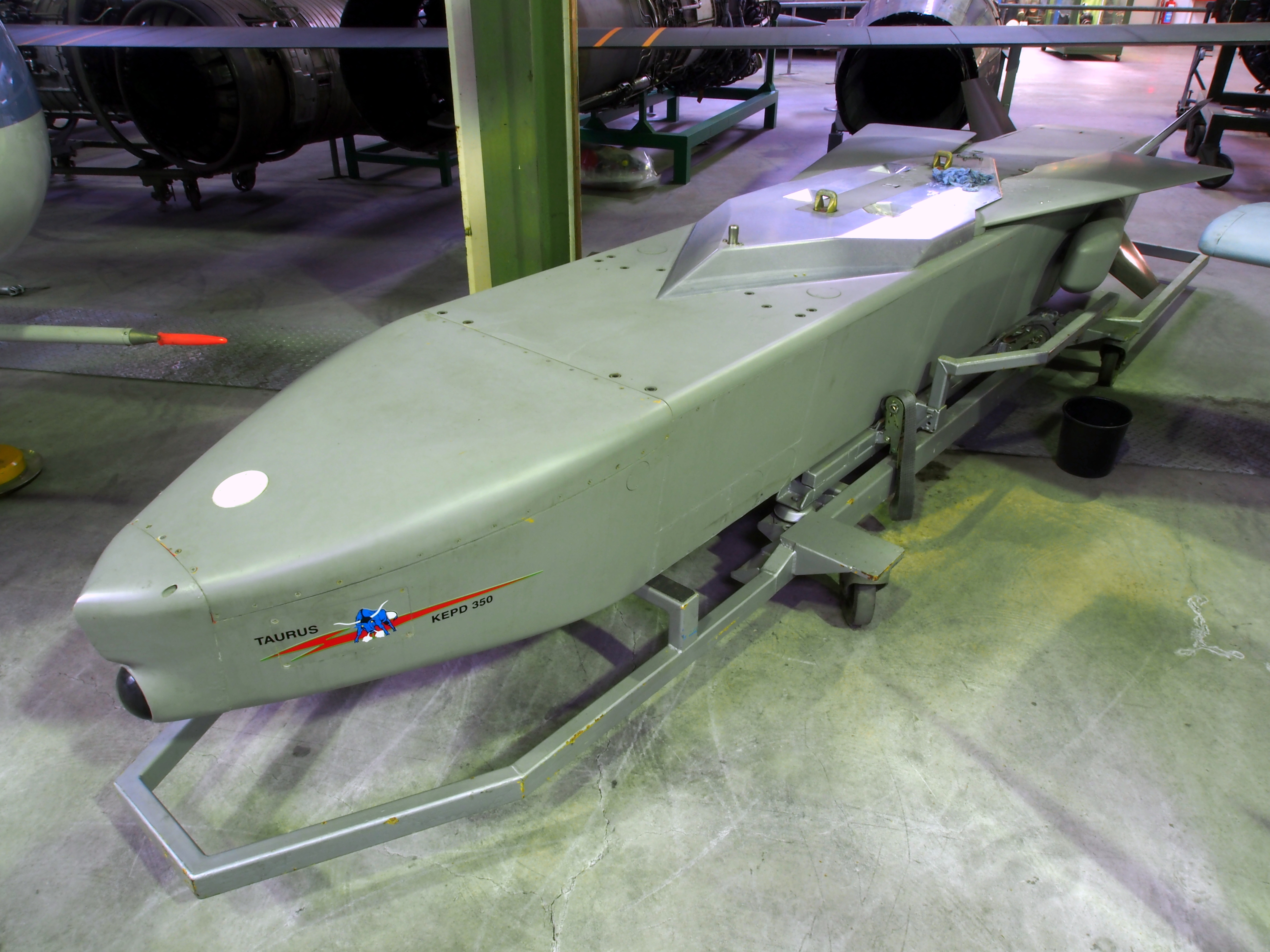 Taurus KEPD 350 Modulare Abstandswaffe